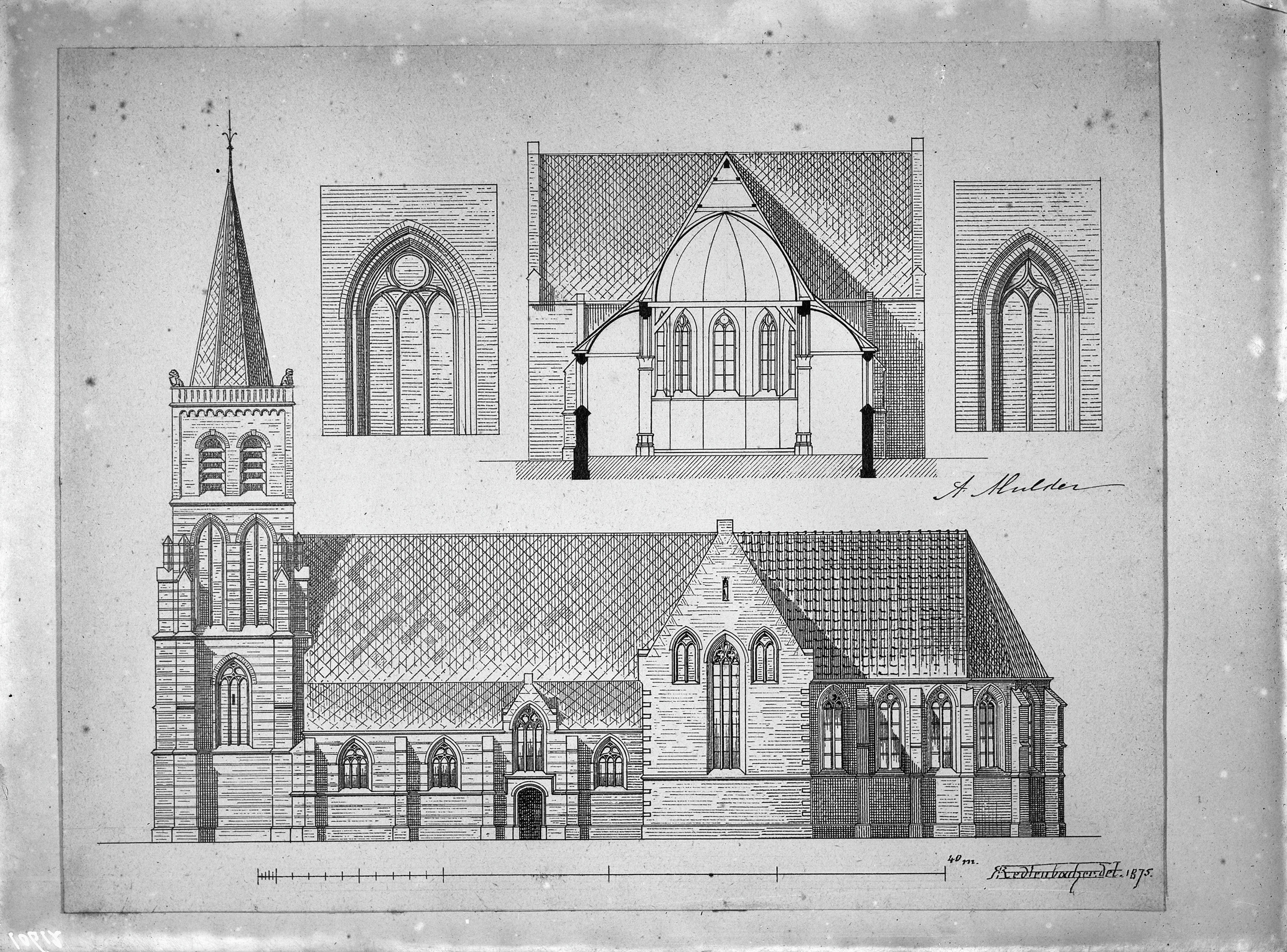 Nederlands Hervormde Kerk en Toren: na opmeting van Redtenbacher